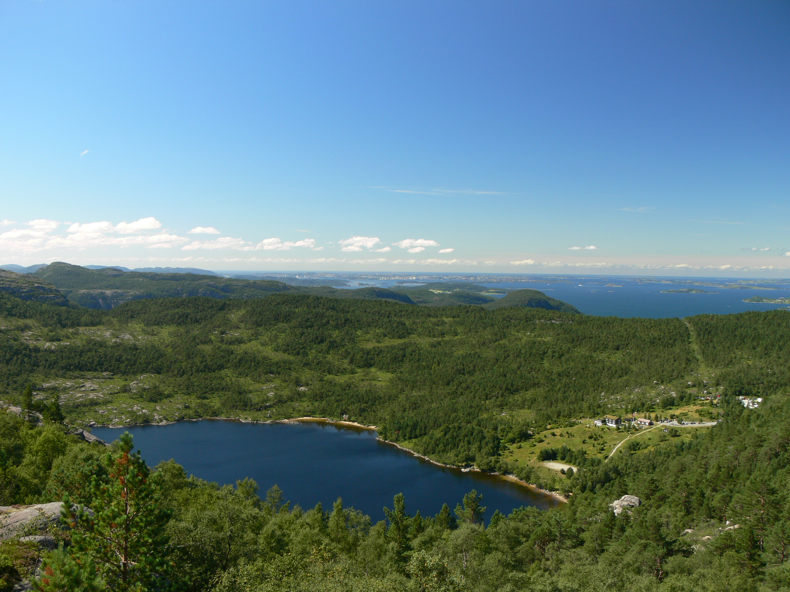 Revsvatnet i Strand/Forsand kommune. Anlegget til høgre er Preikestolhytta/Preikestolen Fjellstue Gleich nach dem Aufstieg gibts die erste schöne Aussicht - inklusive Stavanger am Horizont.